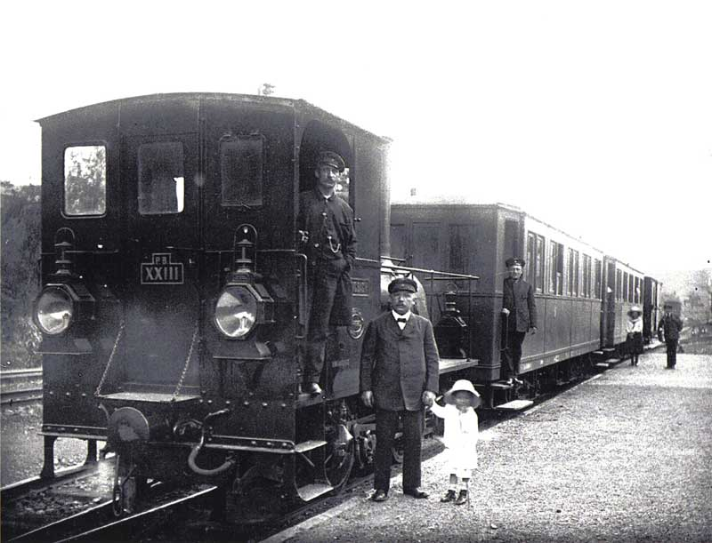 Frühes Foto mit Dampflokomotive Pfälzische L 2. Dampflokomotive XXIII KLINGBACH, der ersten von der Lokomotivfabrik Krauss Co. München im Jahr 1903 für die Strecke Alsenz-Obermoschel gebauten Maschine. Auf der Lok Heizer Seibel, davor Lokführer Volles mit Sohn, auf dem Trittbrett des ersten Wagens Schaffner Weber.